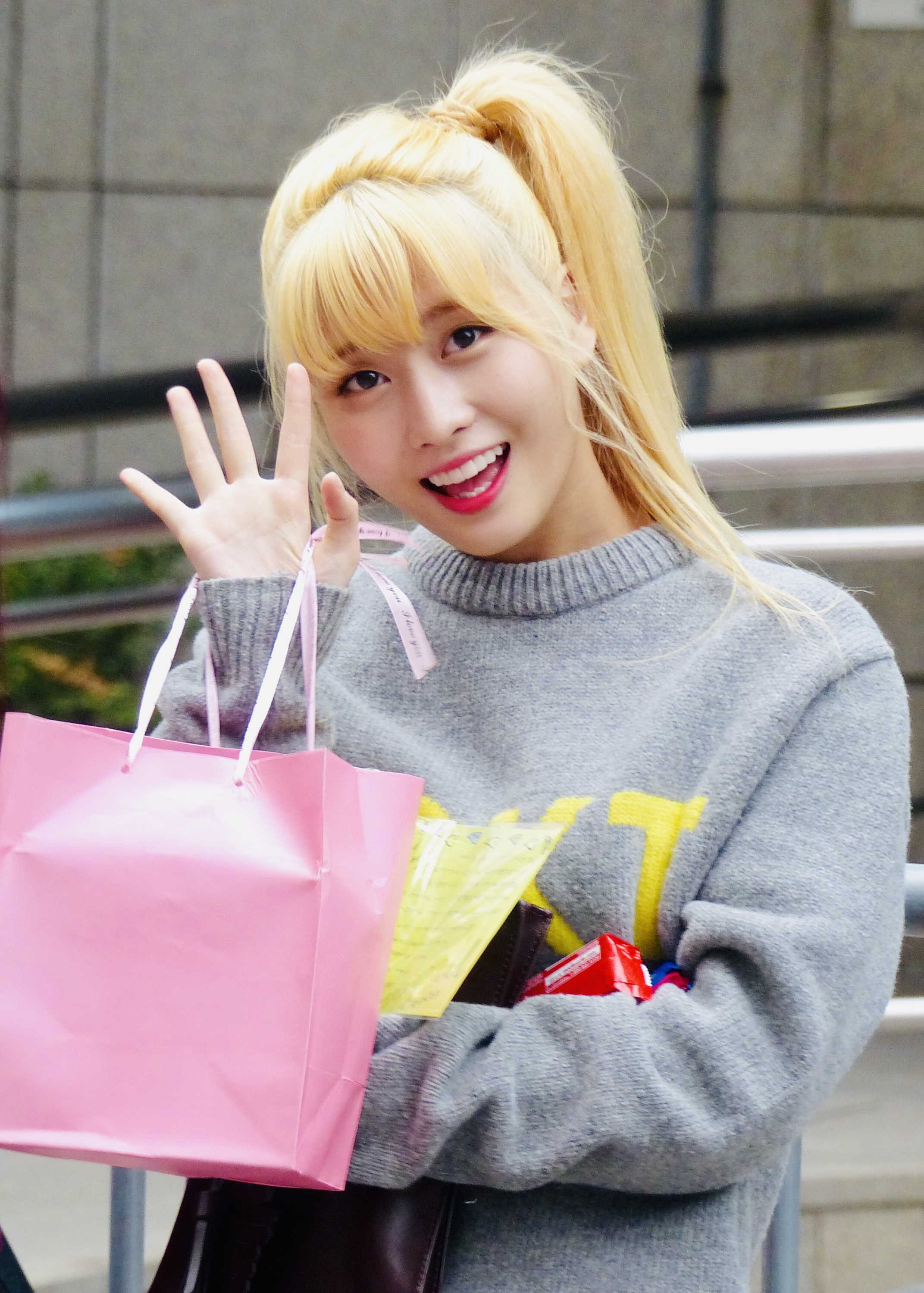 20151023 MUSICBANK MOMO